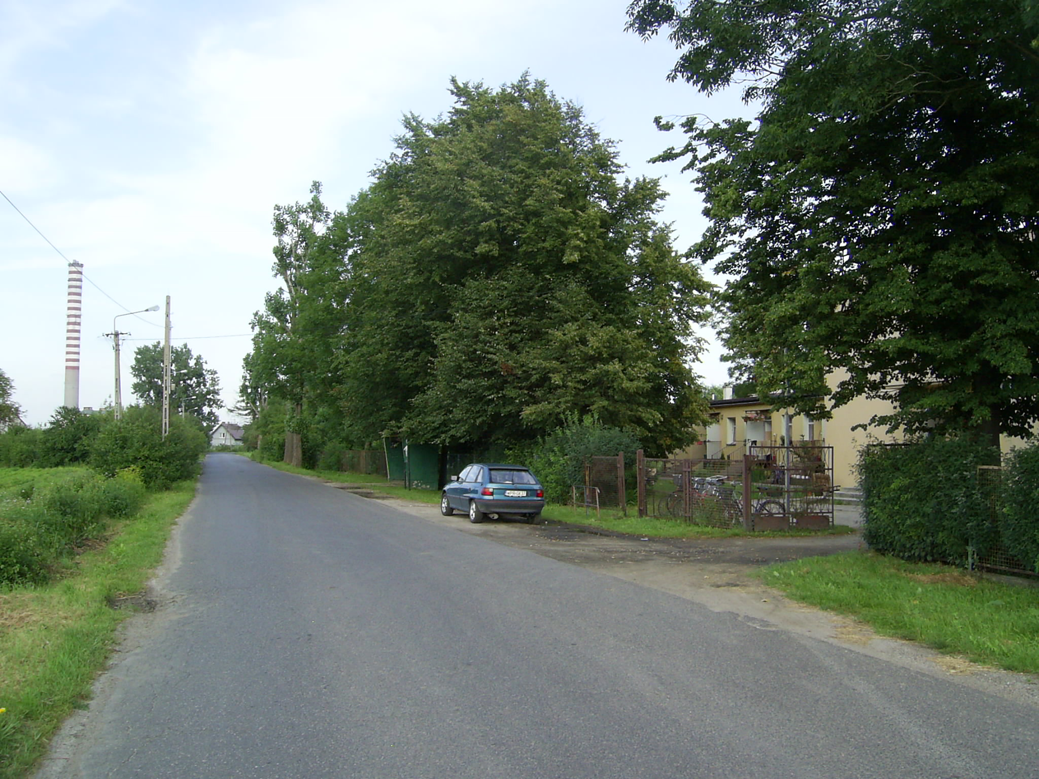 Krosna-Wieś i Elektrociepłownia Pruszków